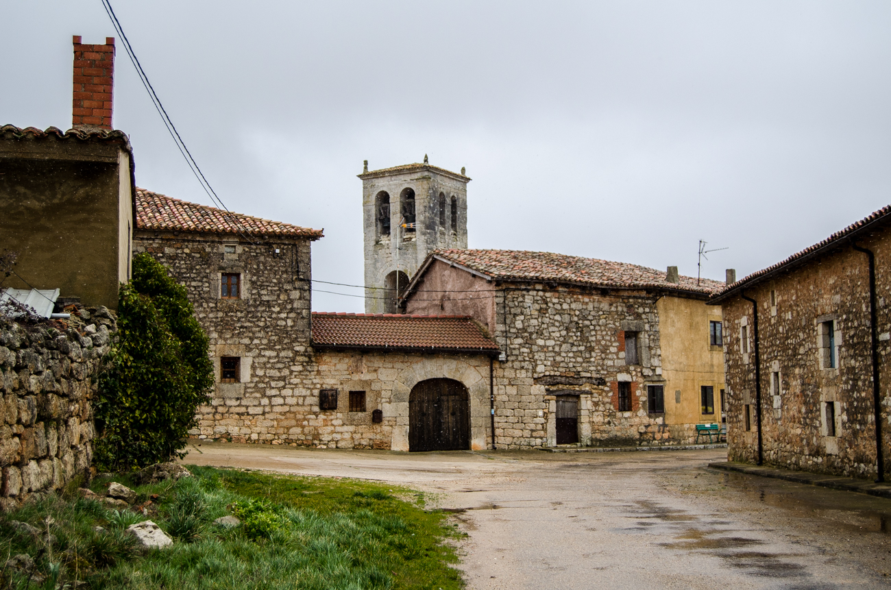 Barrios de Villadiego. Calle.